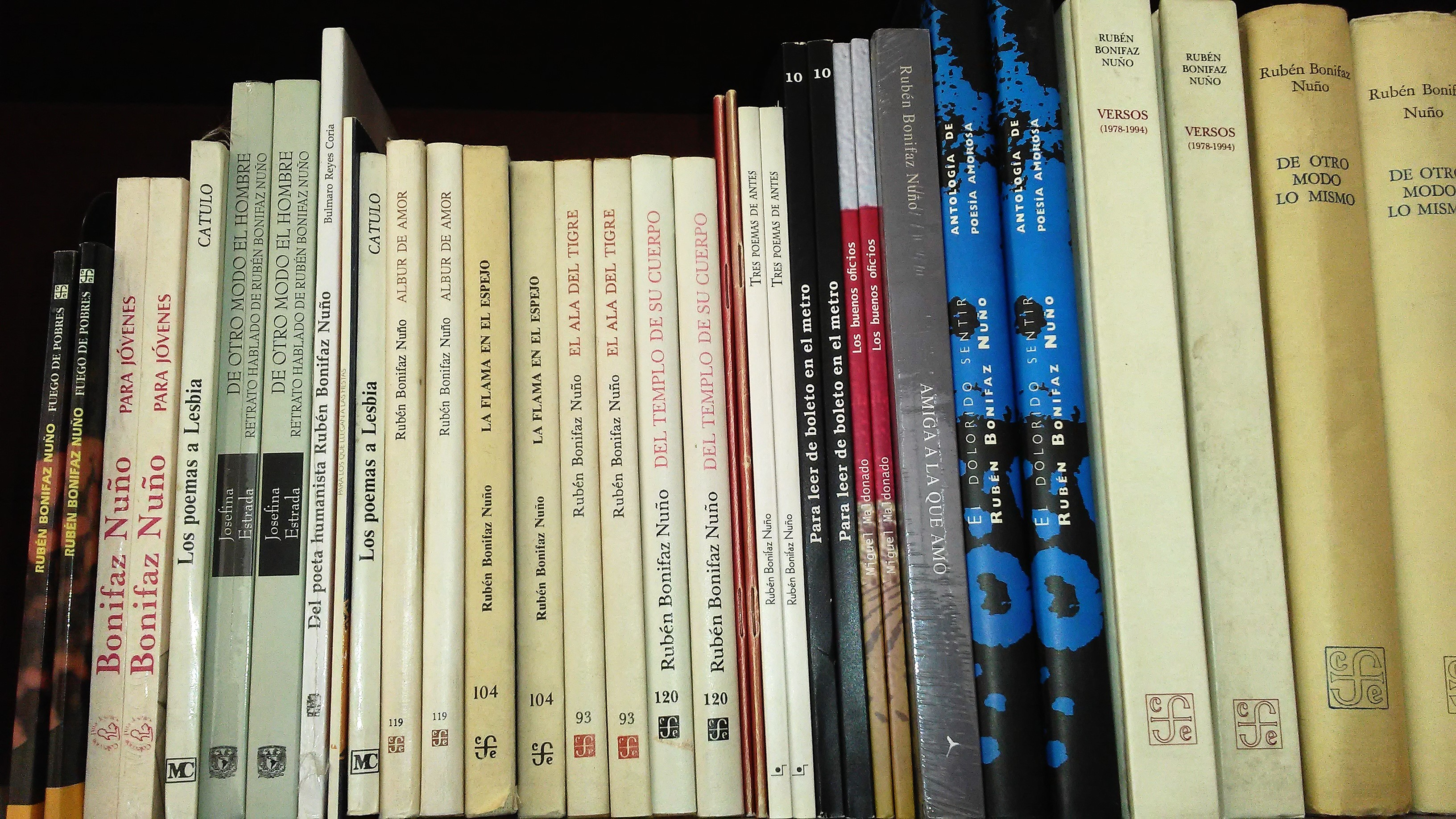 Algunos de los títulos publicados por Rubén Bonifaz Nuño.